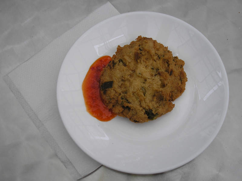 Frikadel Tahu